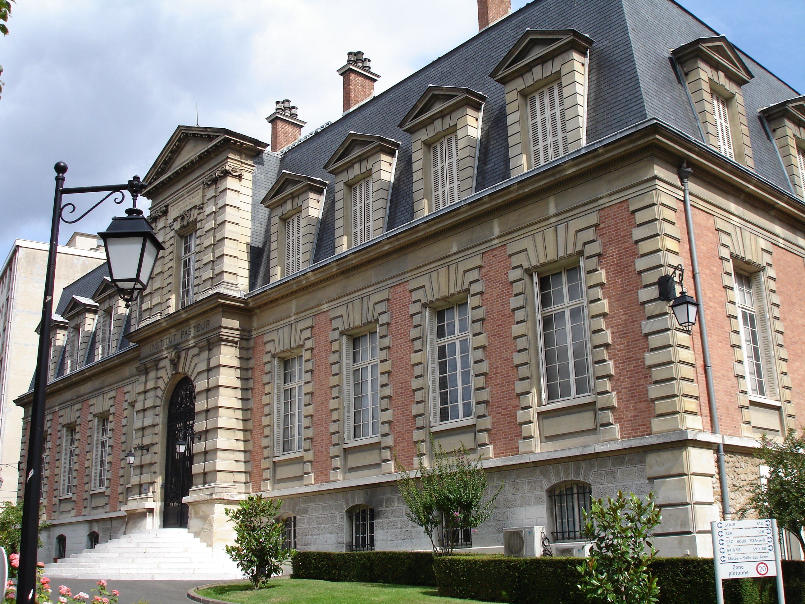 Institut Pasteur, Paris, France